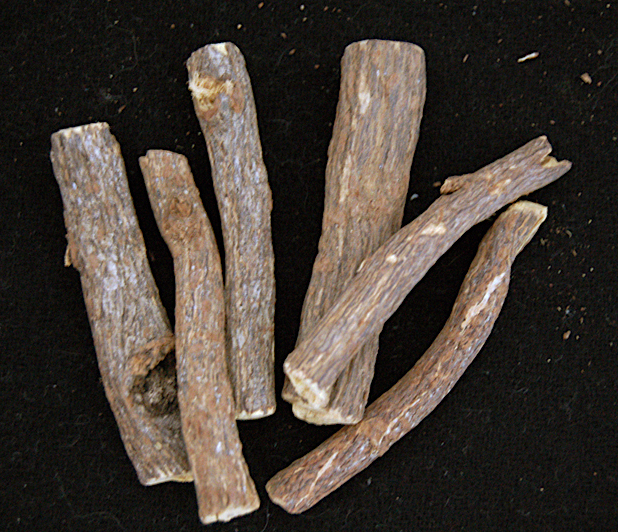 Batons de réglisse